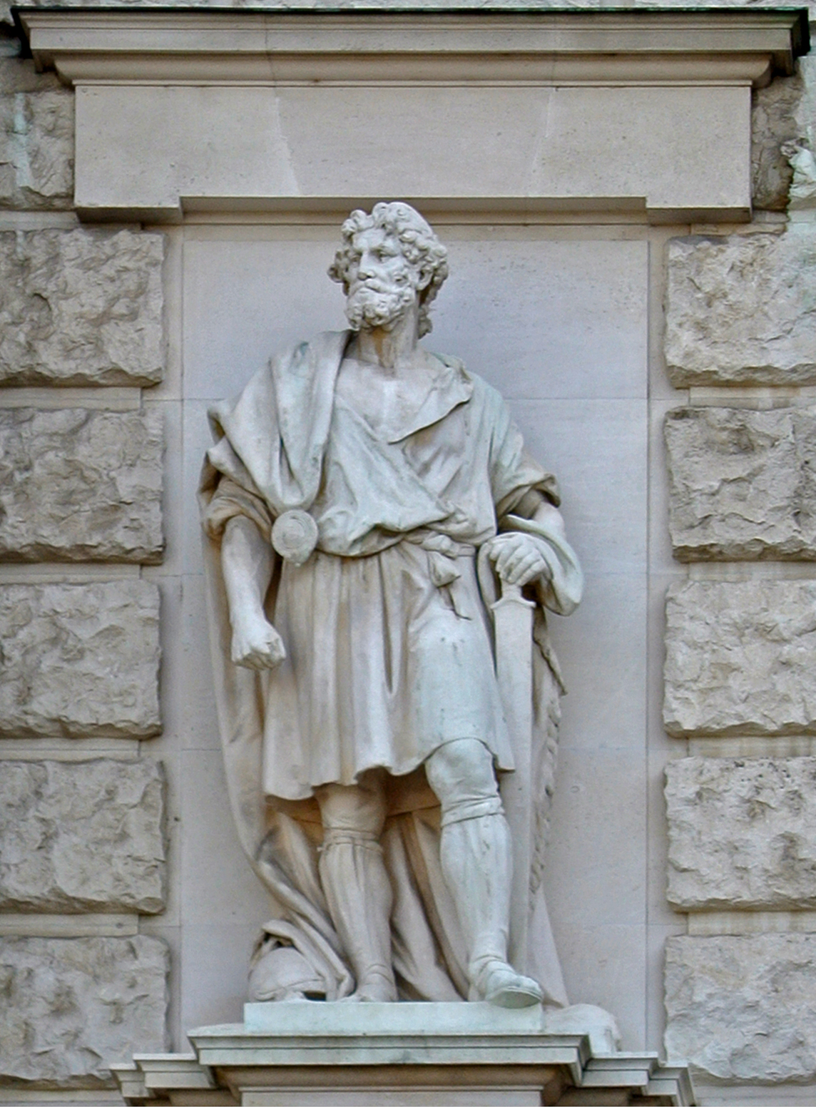 Gestalt aus der österreichischen Geschichte von Johann Scherpe an der Hauptfassade der Neuen Burg Wien